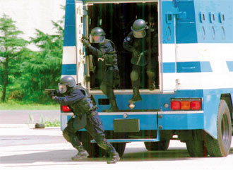 SATの訓練（7月、東京）